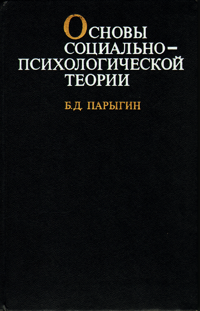 Обложка книги/ Б. Д. Парыгин Основы социально-психологической теории. Москва: Мысль, 352 стр., 20,5 х 13,5 см. Тираж - 20000 экз.